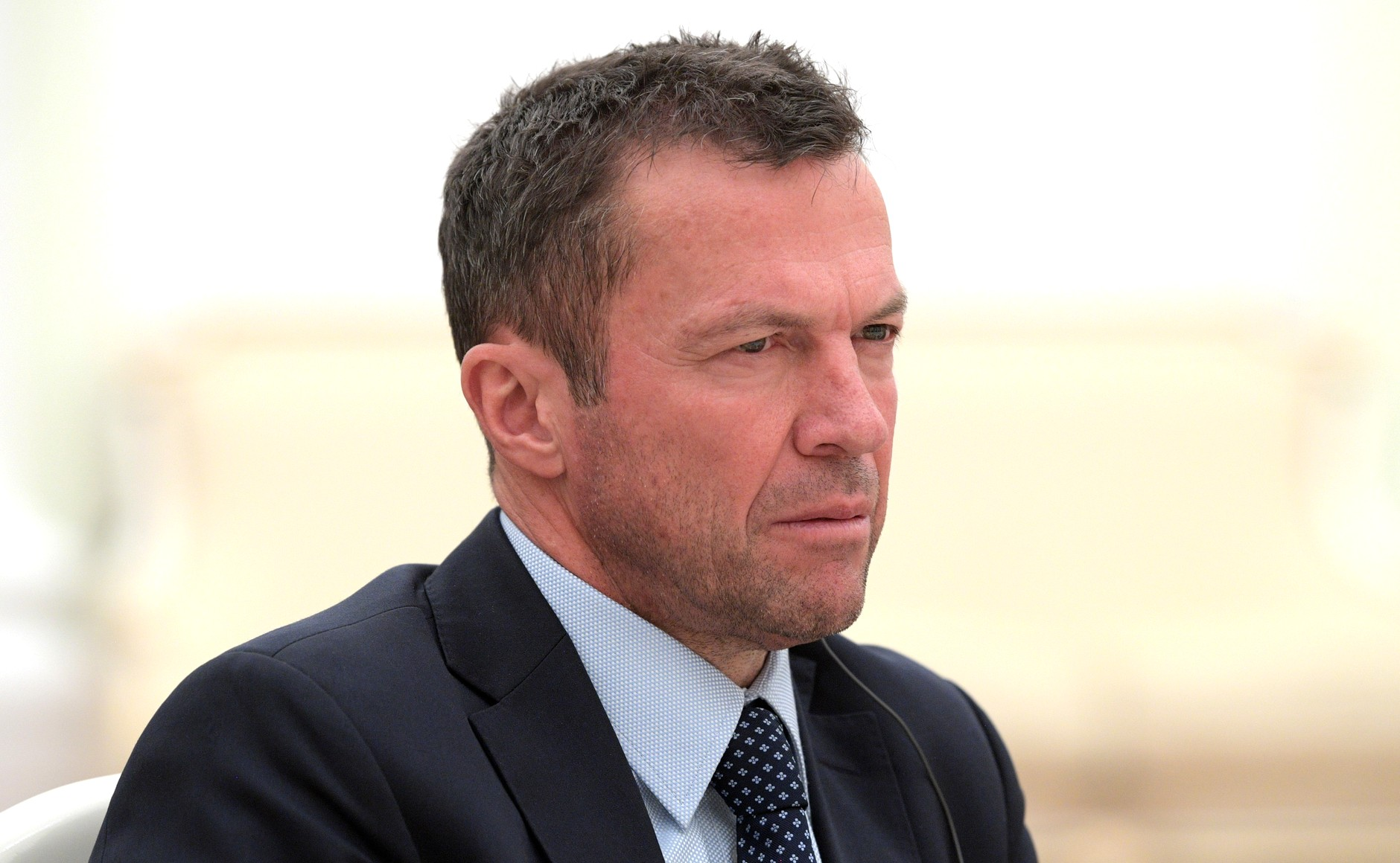 Встреча Президента Российской Федерации Владимира Путина с легендами мирового футбола. Чемпион мира 1990 года в составе сборной команды Германии Лотар Маттеус.